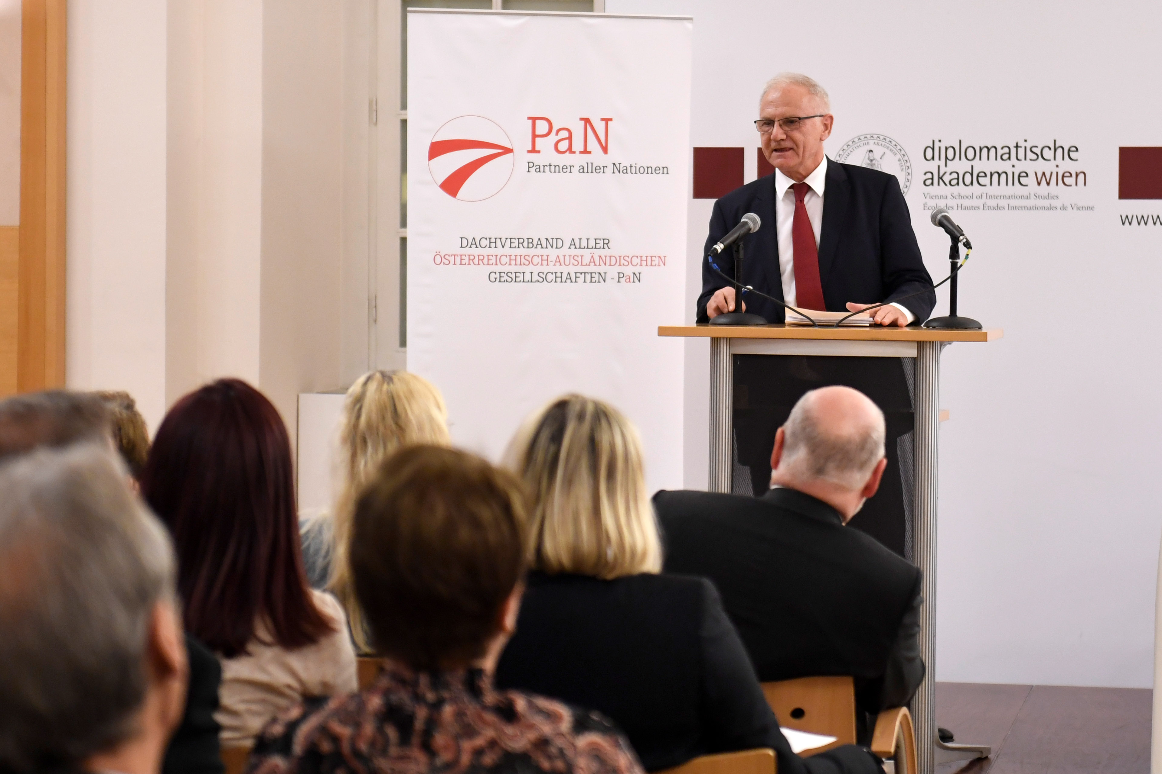 Botschafter Roland Bimo, Botschafter der Republik Albanien in Wien